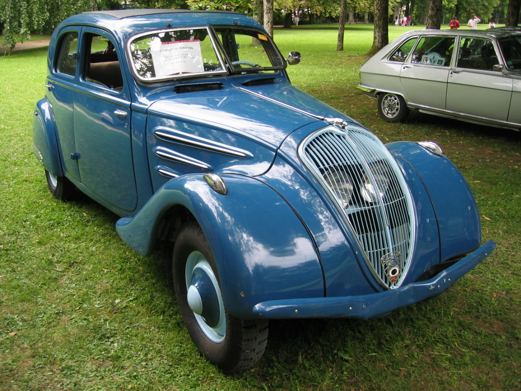 Peugeot 302